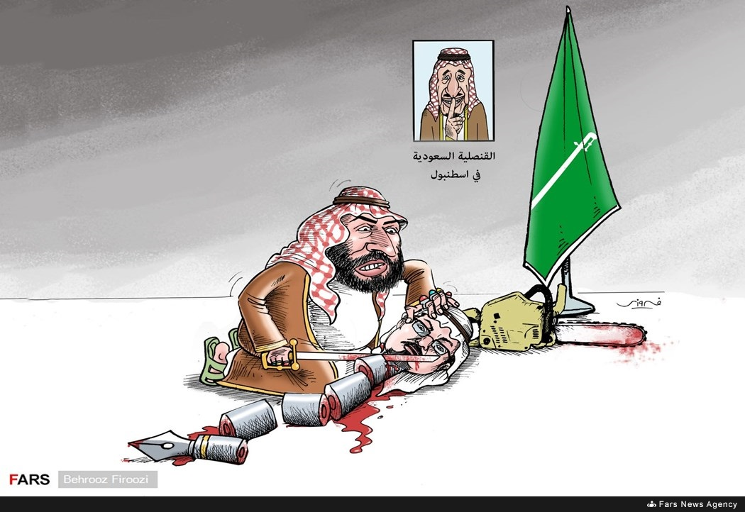 كاريكاتير يُصوّر ولي العهد السعودي محمد بن سلمان وهو يُقطّع جثة الصحفي السعودي جمال خاشقجي داخلَ قنصليّة بلاده في اسطنبول